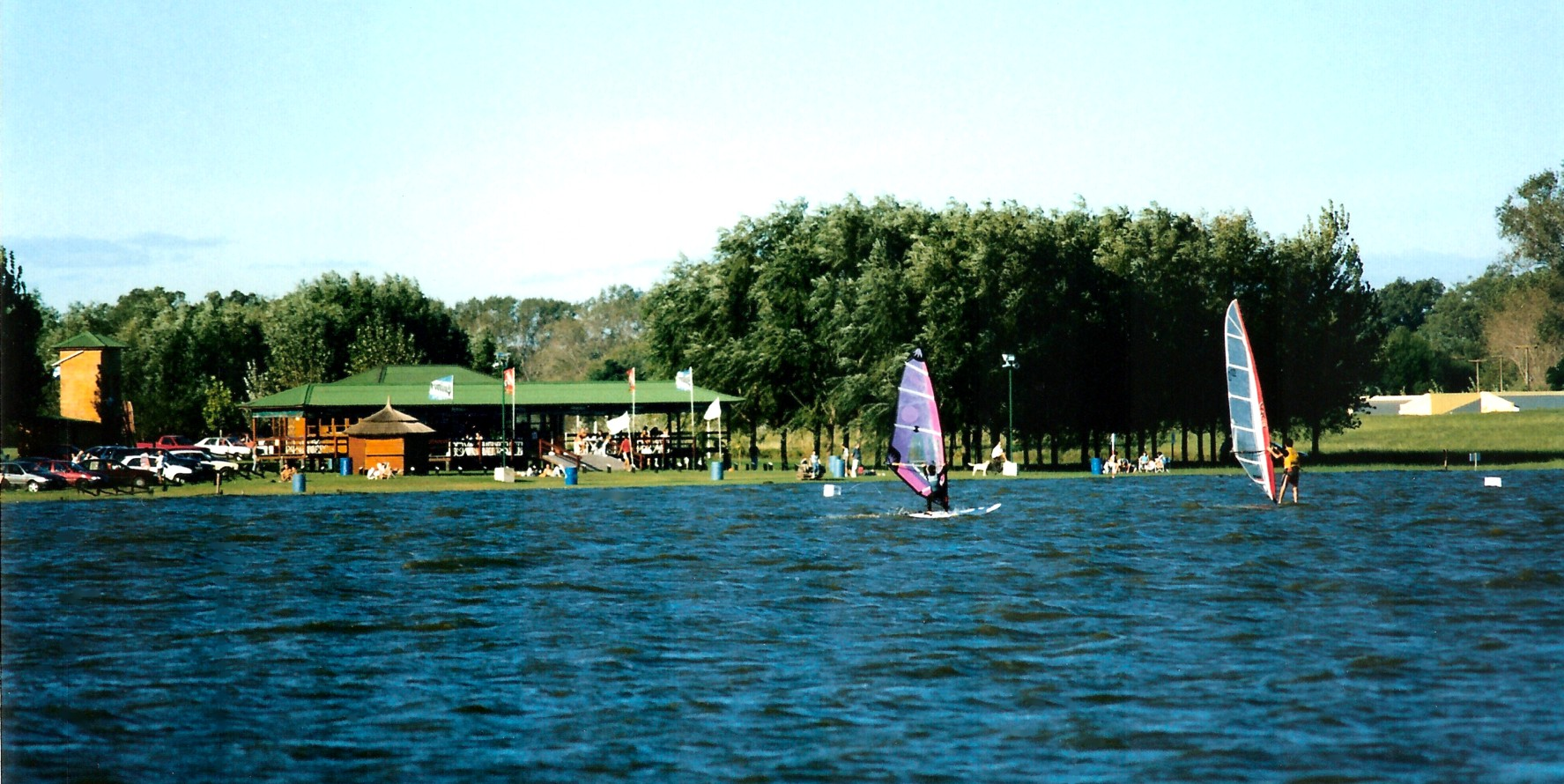 Autor: Germán Ramos.